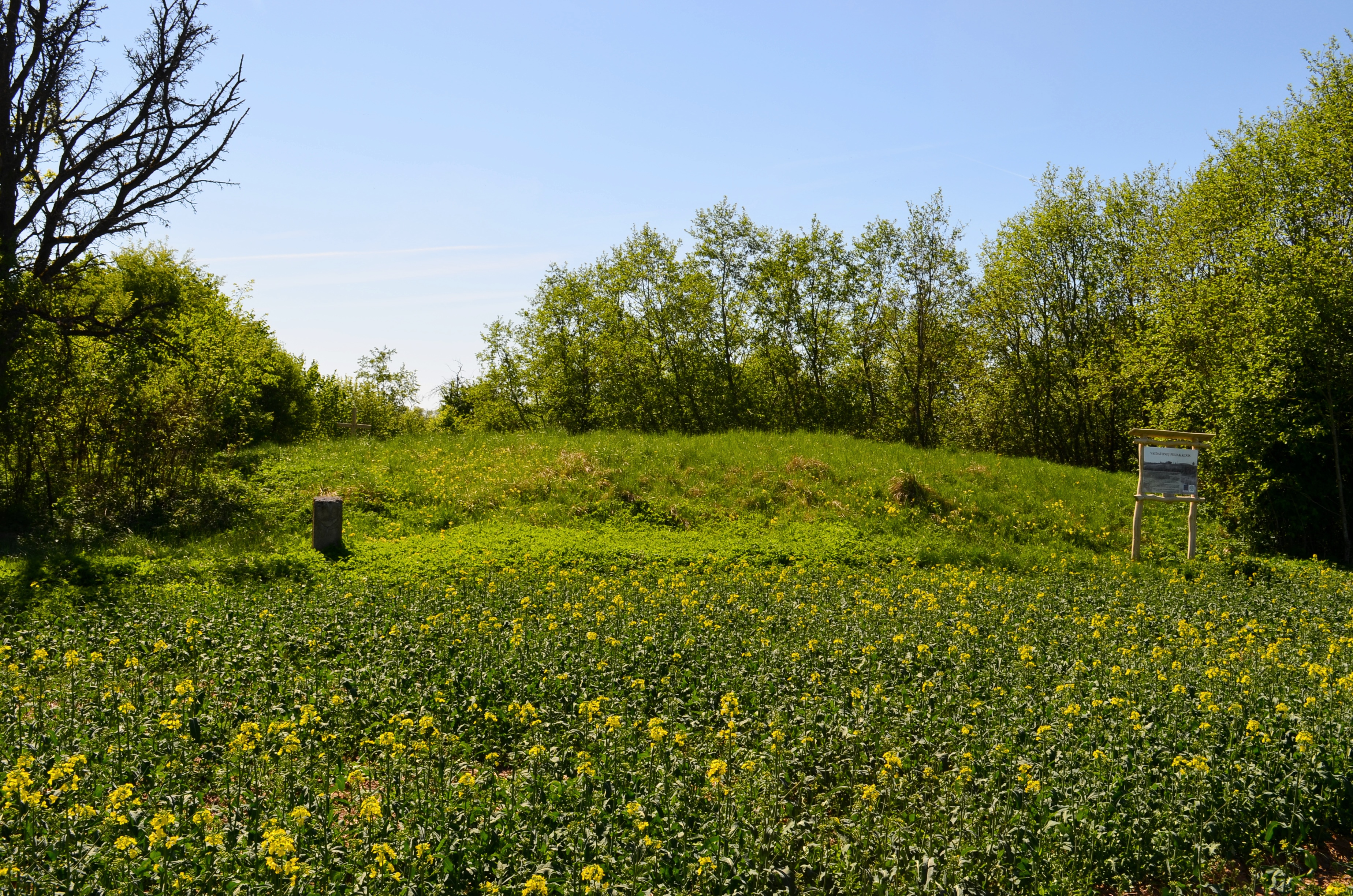 Vaidatonių piliakalnis, Kėdainių raj.